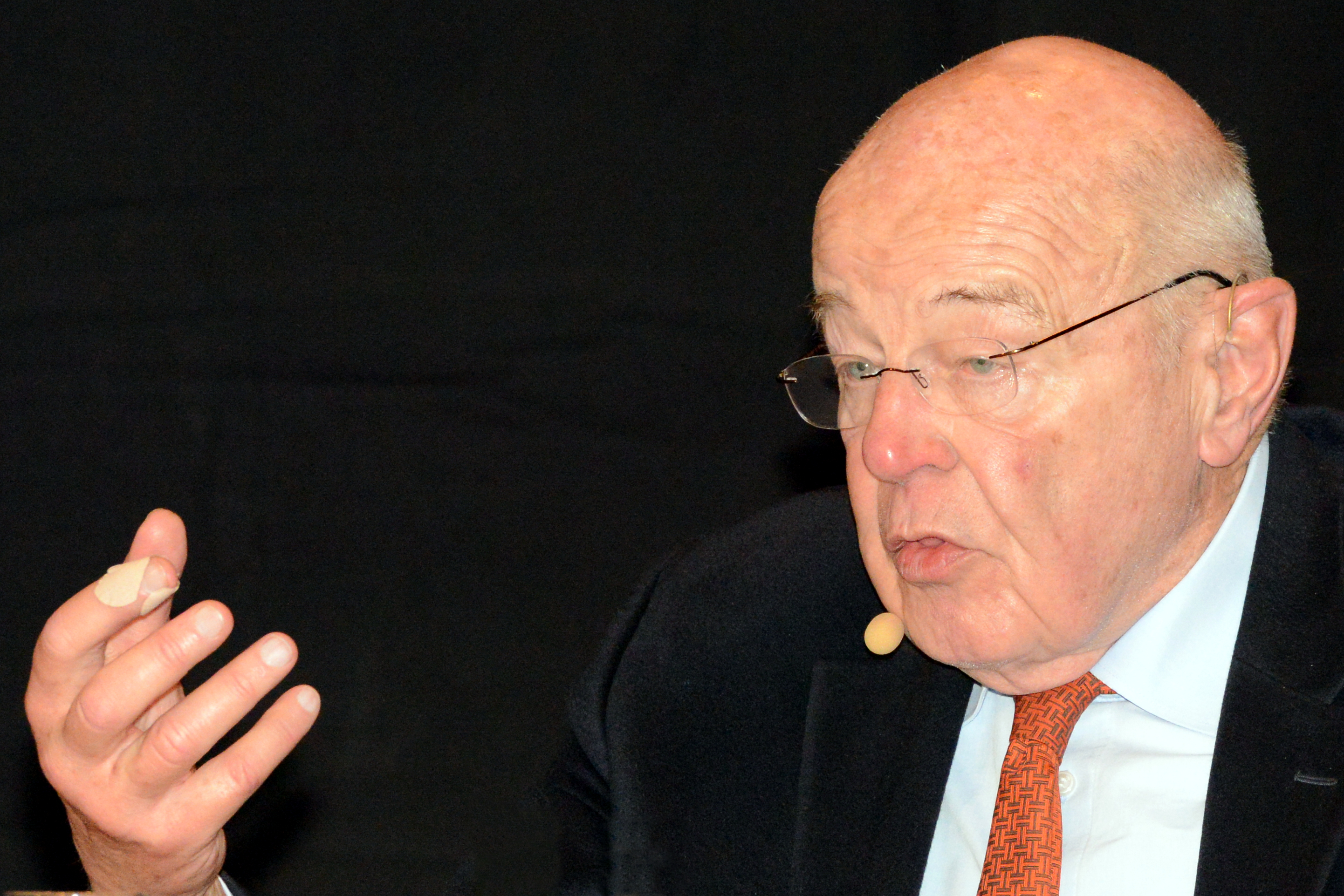 Am Kader vun der Wanderausstellung «Between Shade and Darkness. Le sort des Juifs du Luxembourg de 1940 à 1945», hat d'Gemeng Reckeng op der Mess, zesumme mat der asbl MemoShoah Lëtzebuerg, fir den 31. Mäerz 2015 op en Debat iwwer de Rapport vum Historiker Vincent Artuso zu der «Kollaboratioun vun der Lëtzebuerger Verwaltungskommissioun mat Nazi-Däitschland», invitéiert. Mam Vincent Artuso hunn diskutéiert de fréiere Minister an Auteur vum Buch Luxemburg im Wandel der Zeiten, Erinnerungen (1927-2014), Jean Hamilius, als Zäitzeien, an den Henri Juda, President vu MemoShoah Lëtzebuerg. D'Danielle Schumacher, Journalistin beim Lëtzebuerger Wort, huet d'Diskussioun moderéiert. De Jean Hamilius betount, datt hie säi Buch als Reaktioun op en Artikel am Land vum 11. November 2011 geschriwwen huet. Hie war entsat iwwer dat wat hien do huet misse liesen a wollt seng Erënnerungen un d'Zäit vun der Occupatioun dogéint setzen. Den Artikel am Land hat d'Iwwerschrëft Dépasser le mythe national a war vum Vincent Artuso.